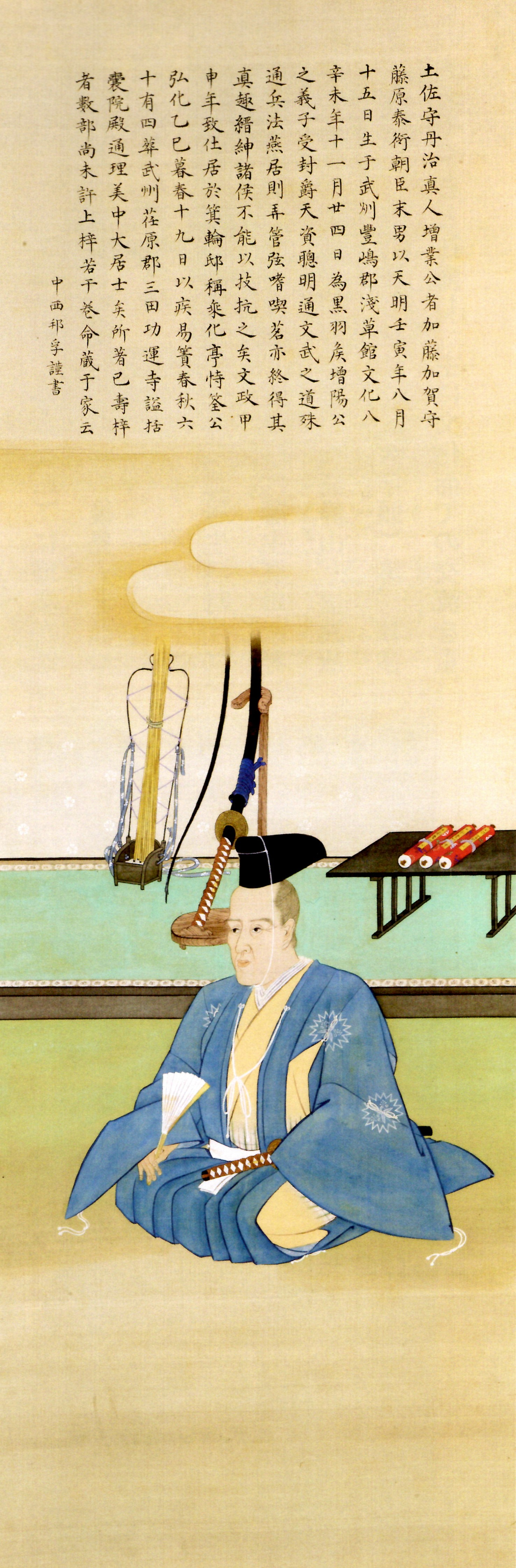 大関増業の肖像。